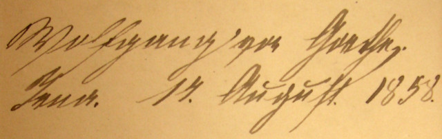 Wolfgang von Goethe (der Enkel Johann Wolfgang von Goethes) hat seinen Namen, Ort (Jena) und Datum (17. August 1858) in einer Erstausgabe des Allgemeinen Deutschen Kommersbuches hinterlassen